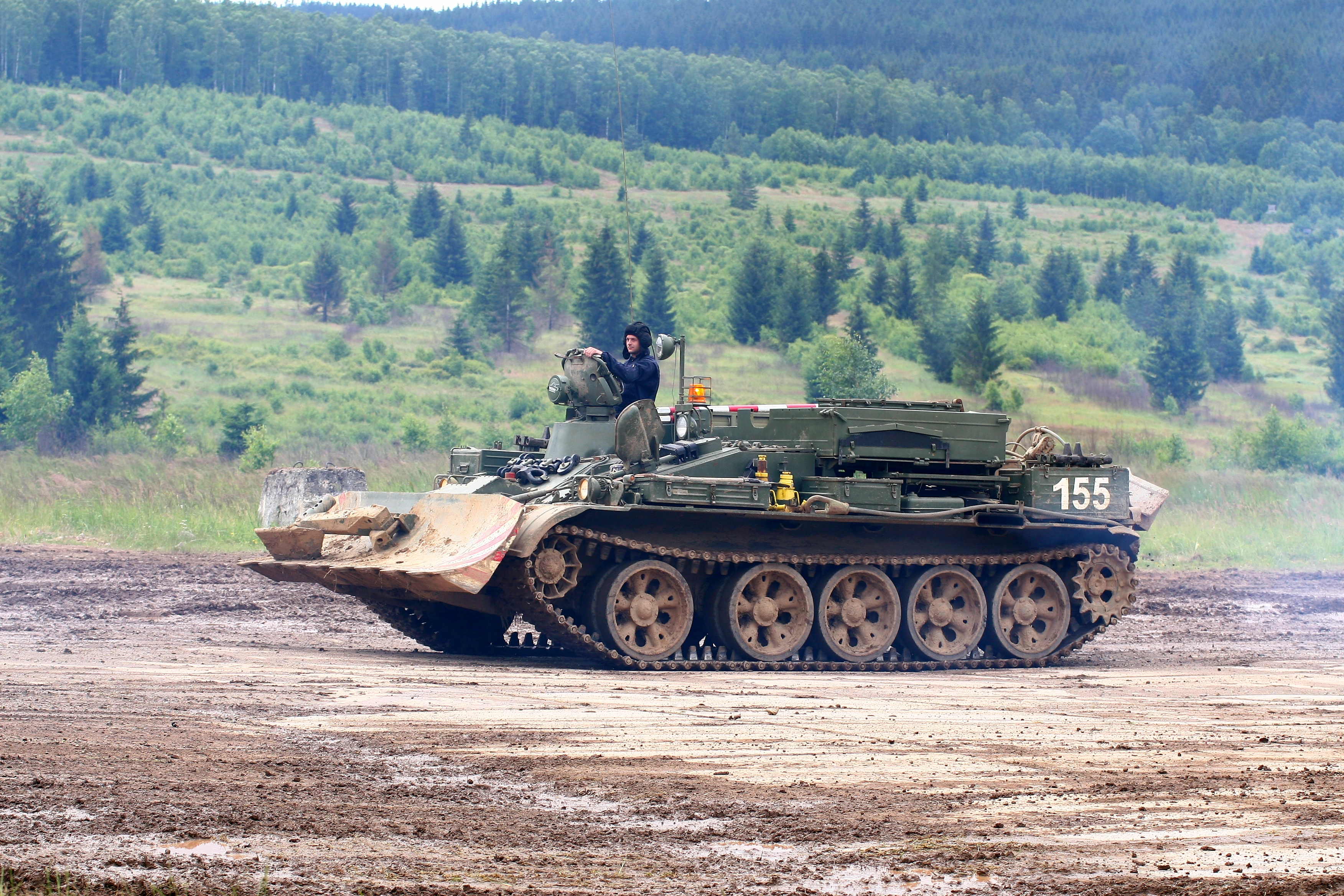 Vojenská technika zaznamenaná při dynamických ukázkách na Dni pozemního vojska BAHNA 2018, který pořádá Velitel společných sil a Nadace pozemního vojska AČR.